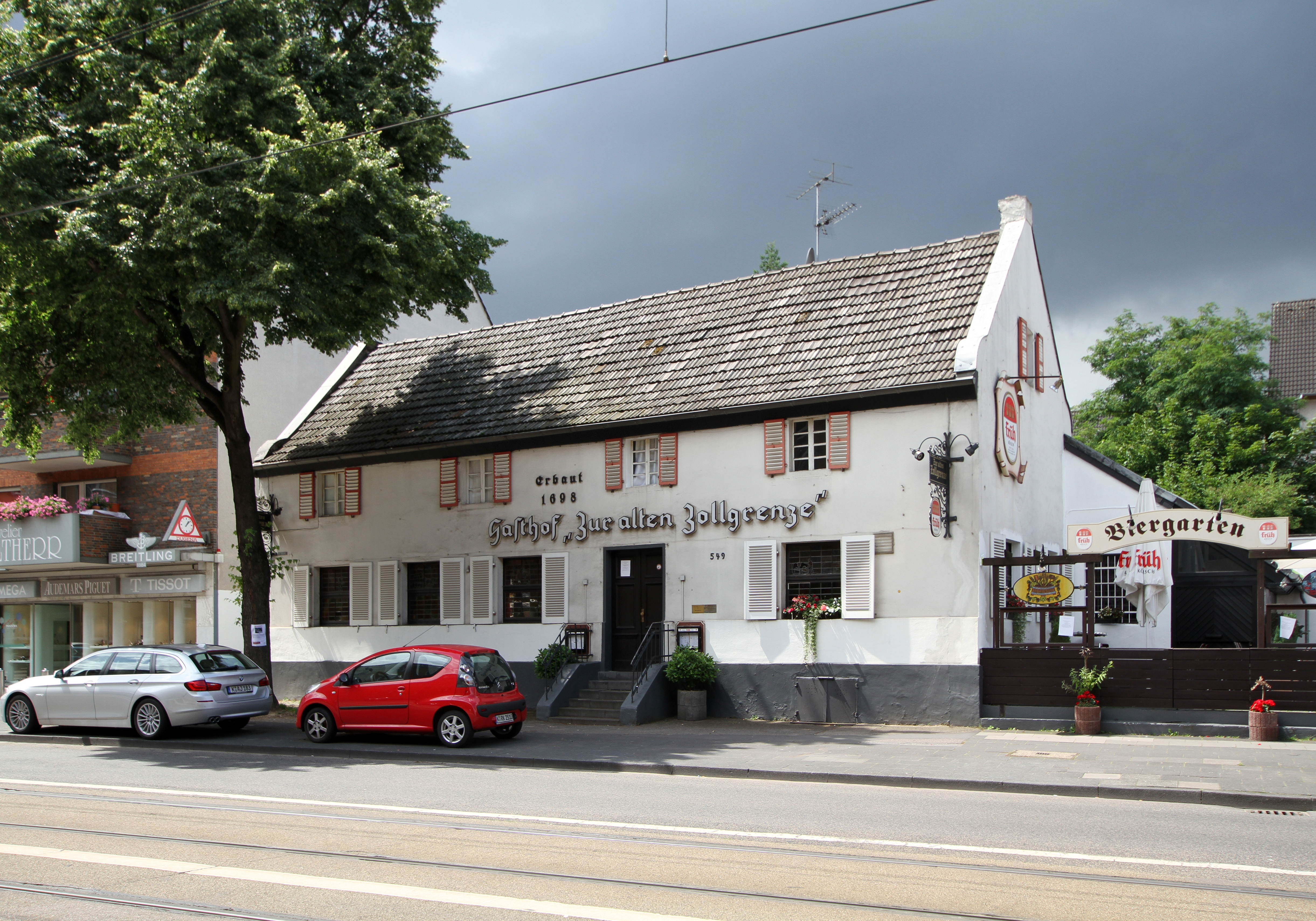 Köln-Weidenpesch, Gasthof „Zur alten Zollgrenze“ Neusser Straße 547–549